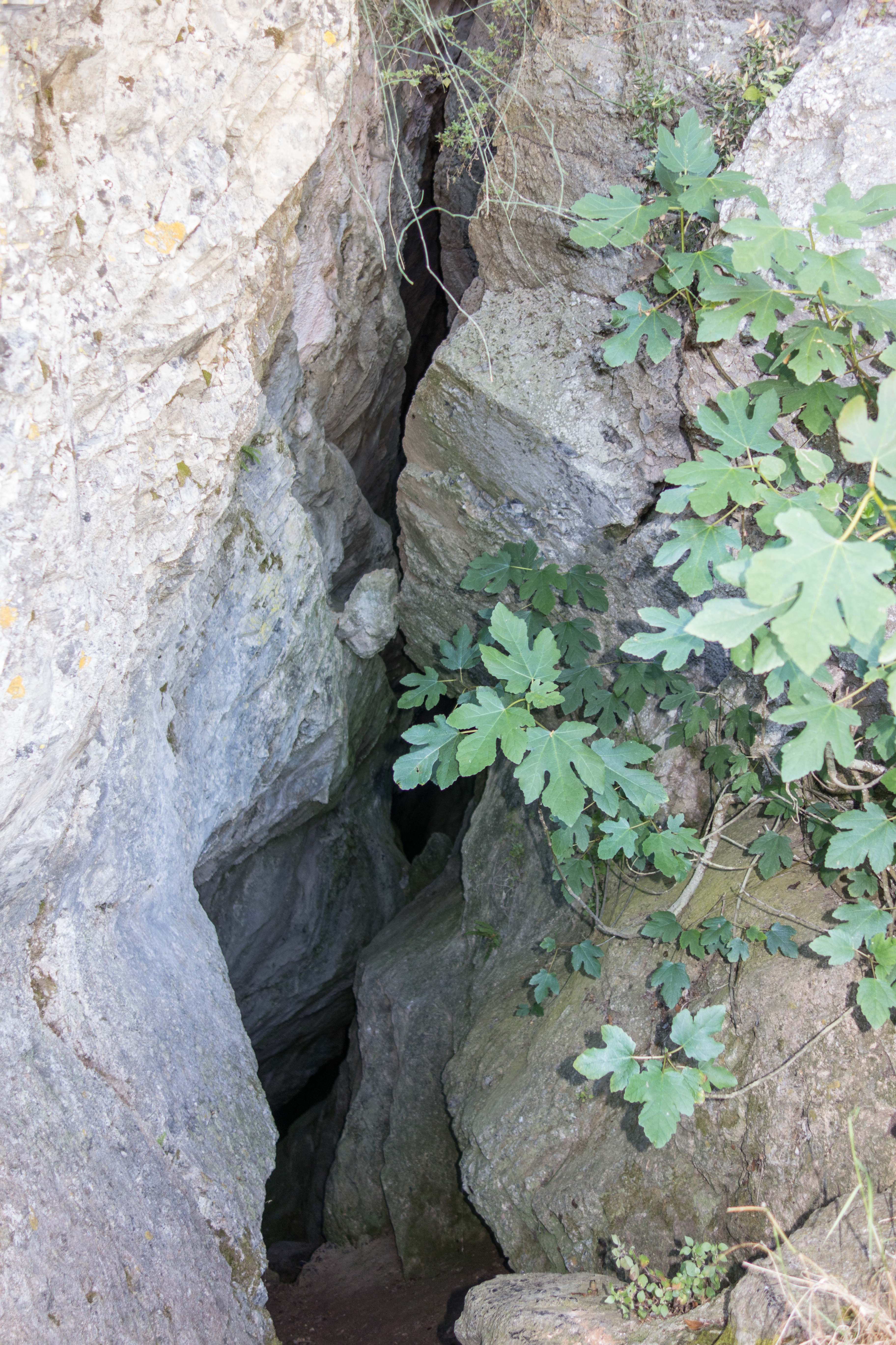 Σπήλαιο Καιάδας«Σπήλαιο Καιάδας»